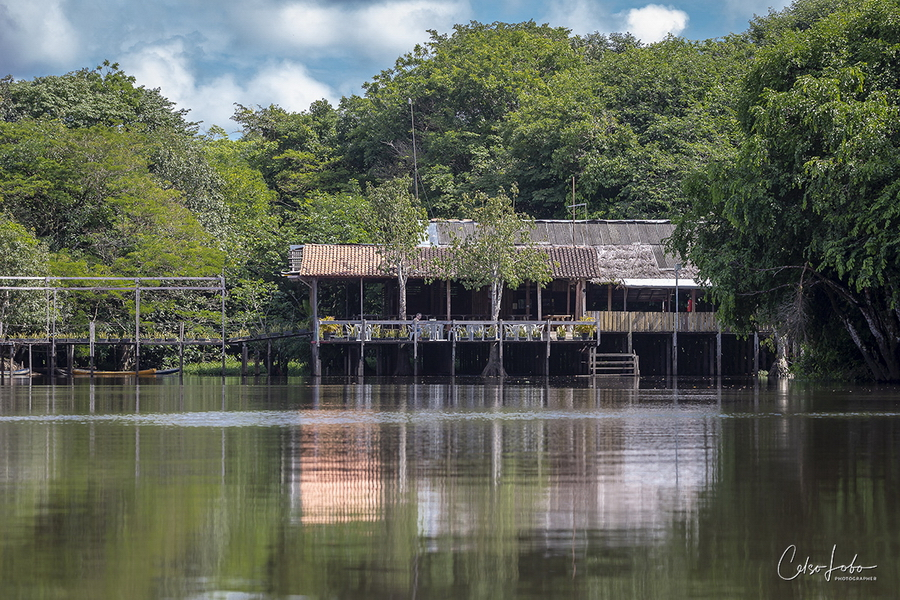 Caraparu